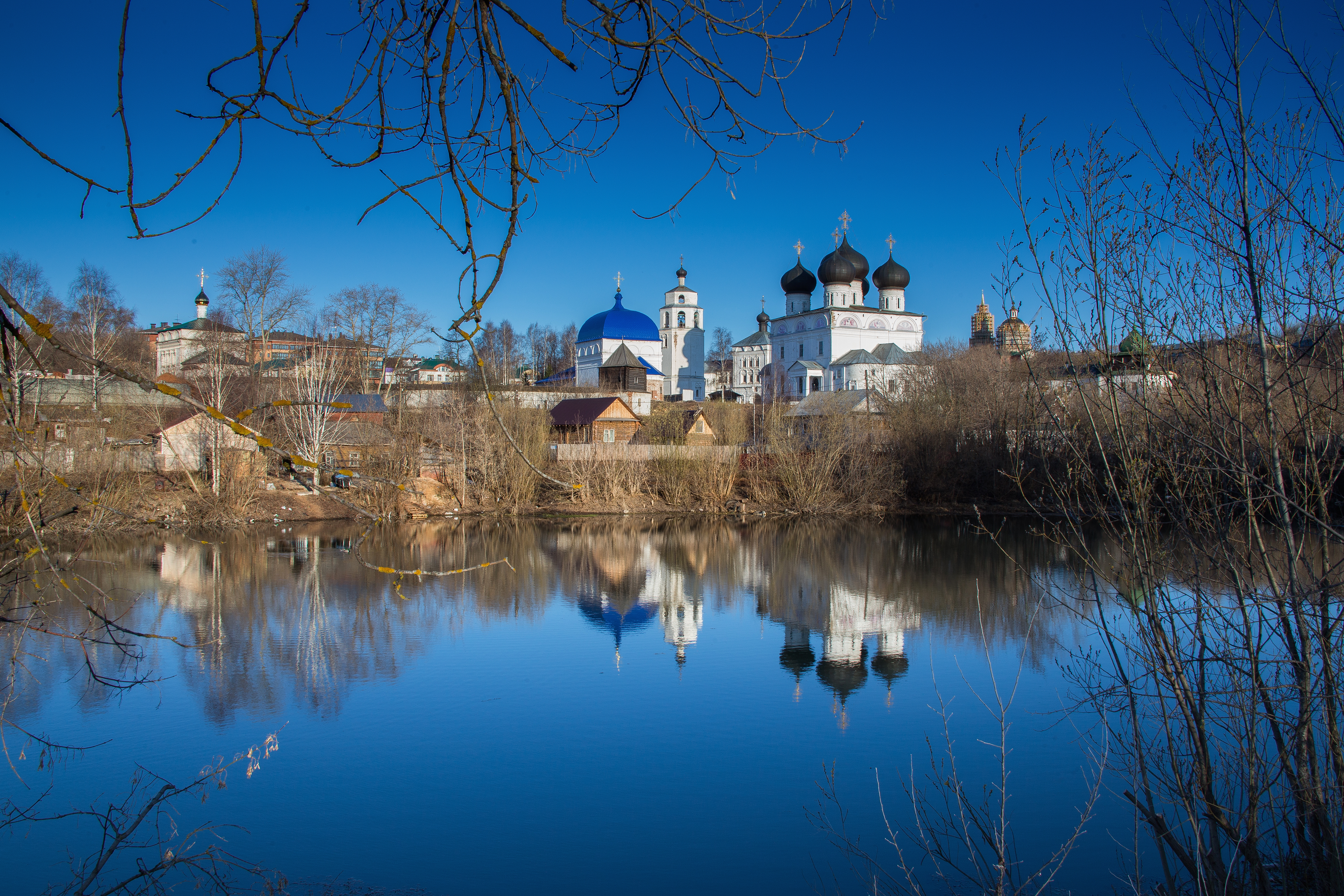 Ансамбль Трифонова монастыря: улица Горбачева, 4, Киров, Кировская область